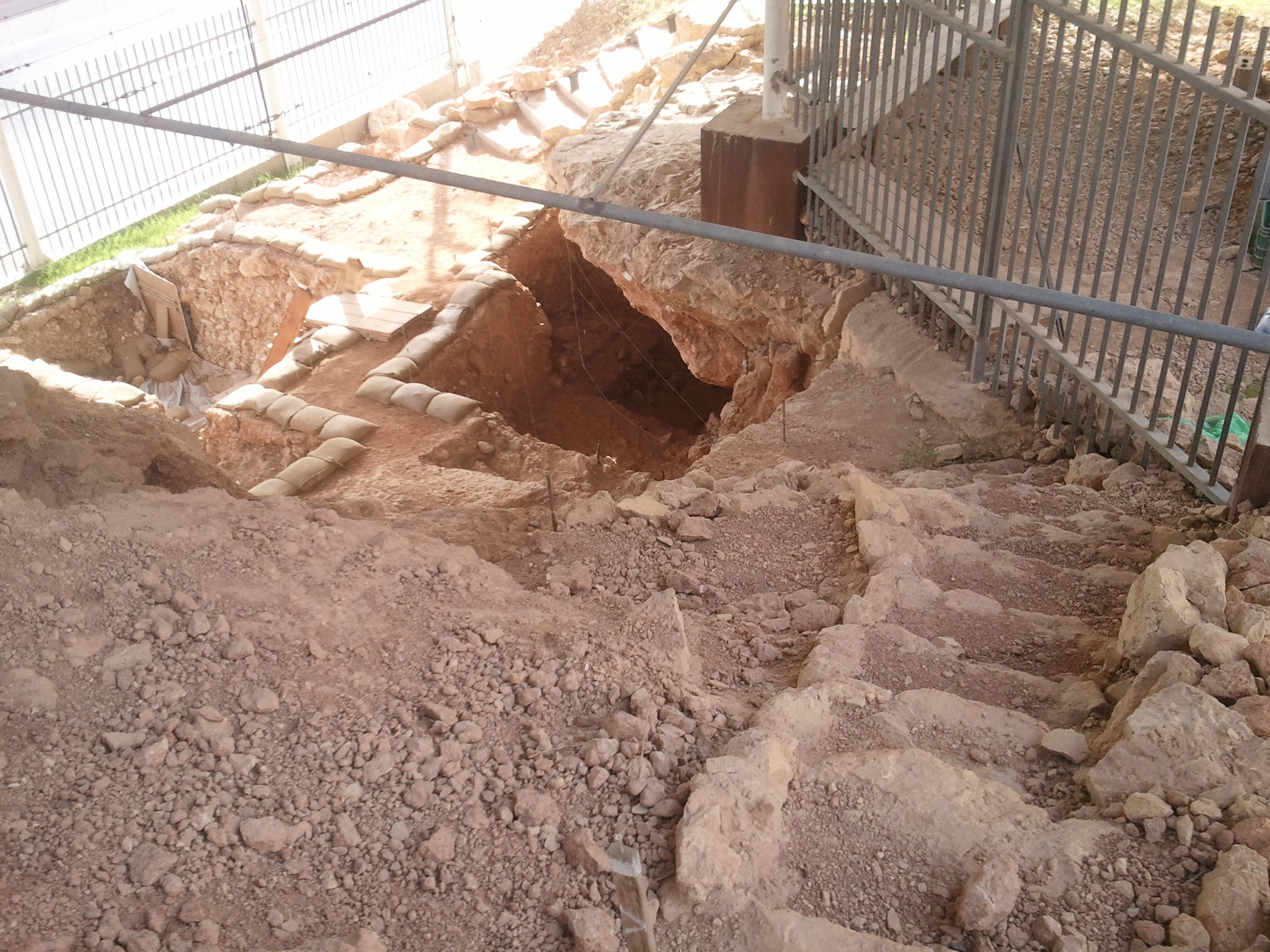 מערת קסם